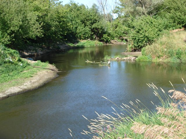 Bzura w miejscowoś›ci Kompina